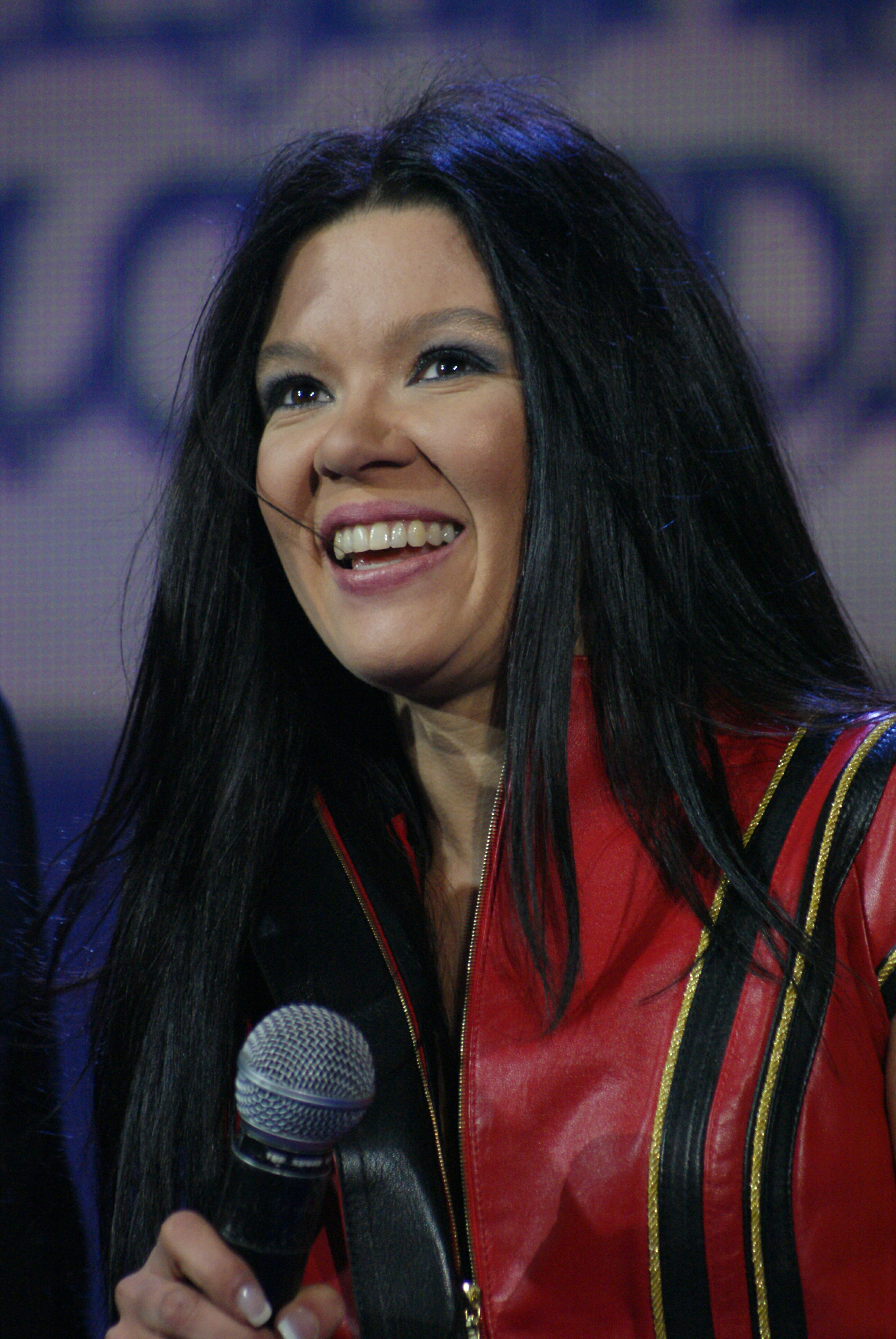 Ruslana